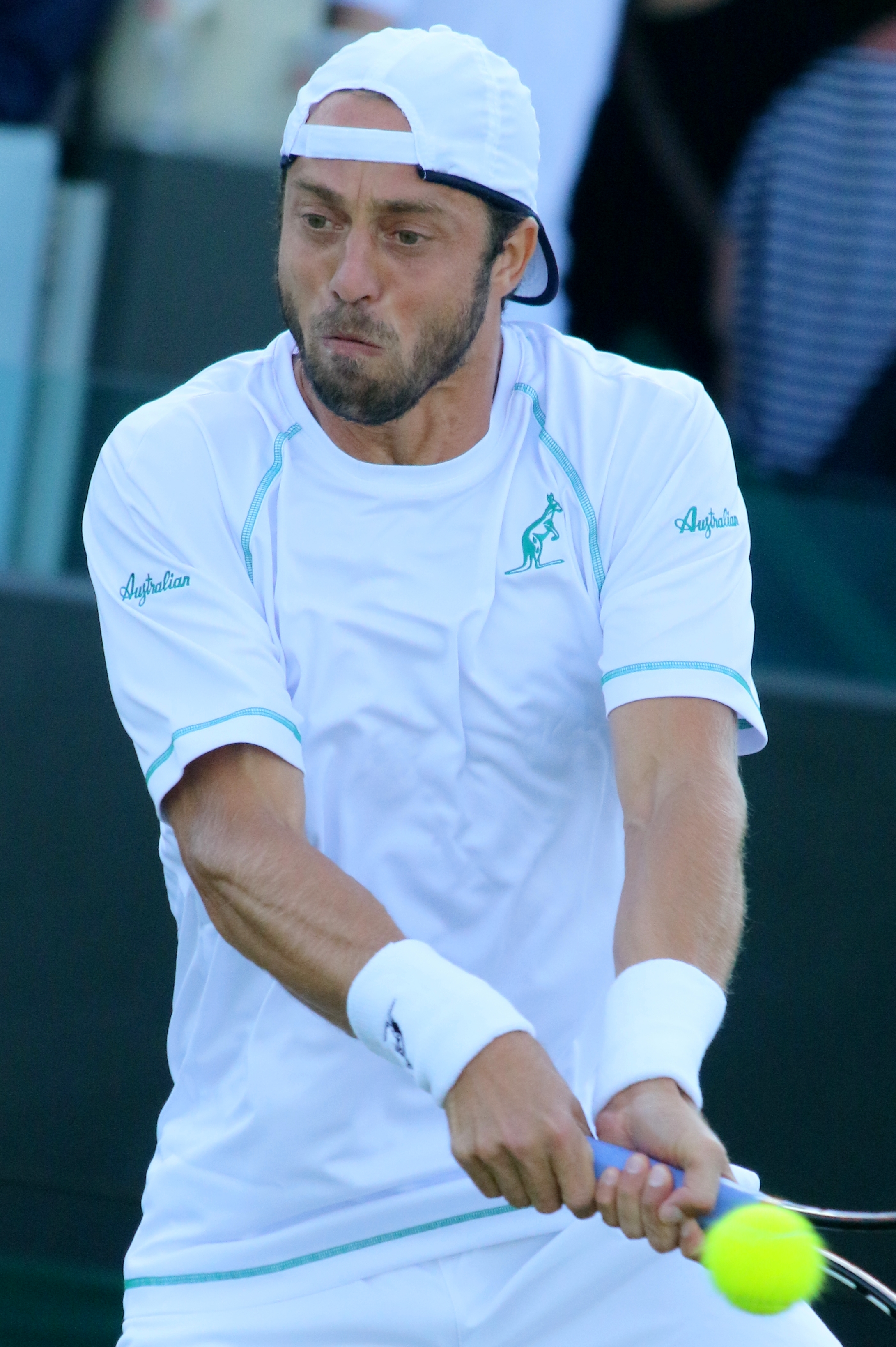 Lorenzi WM17 (4)